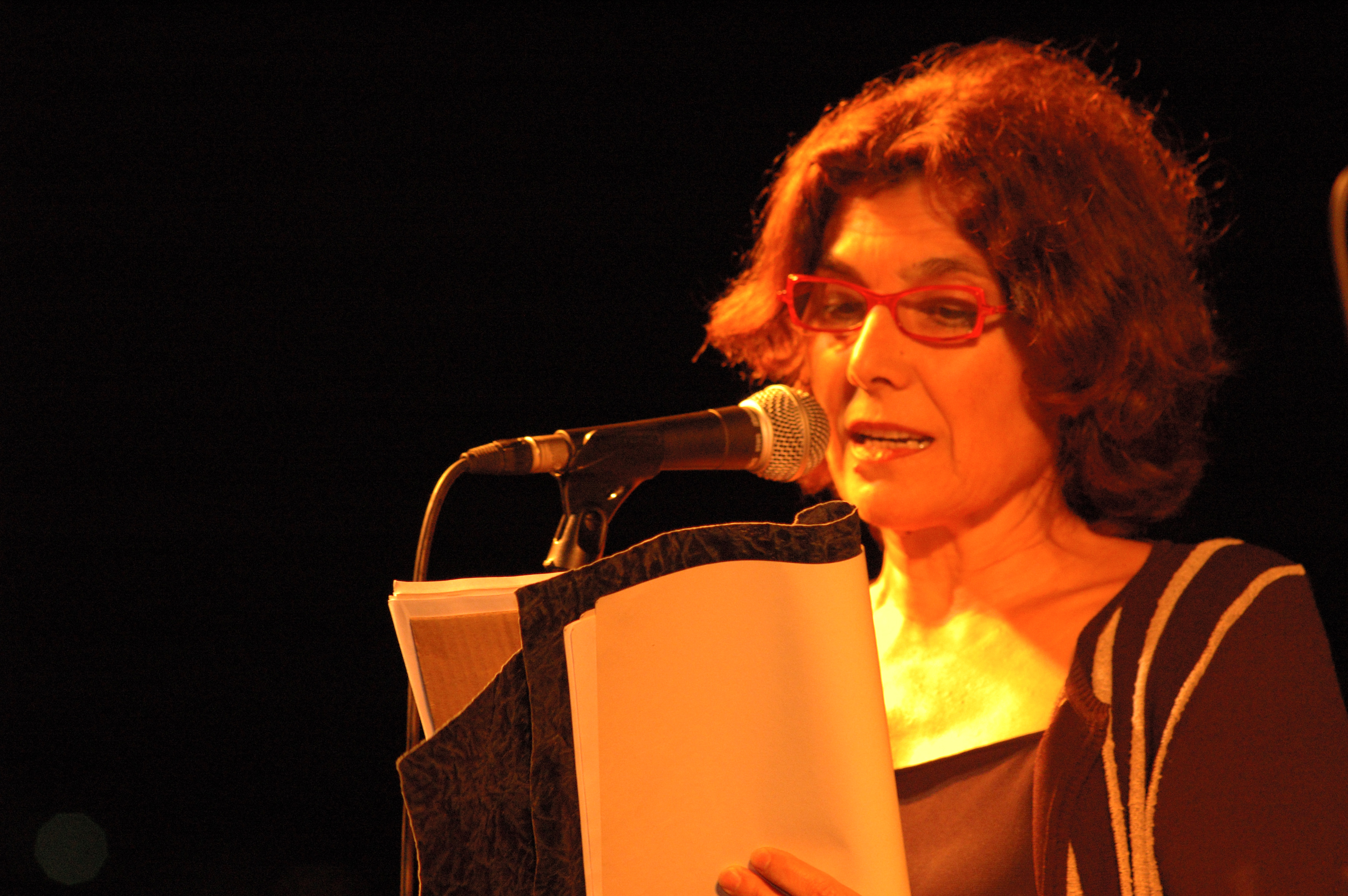 Pepa López al MHC el 2005.